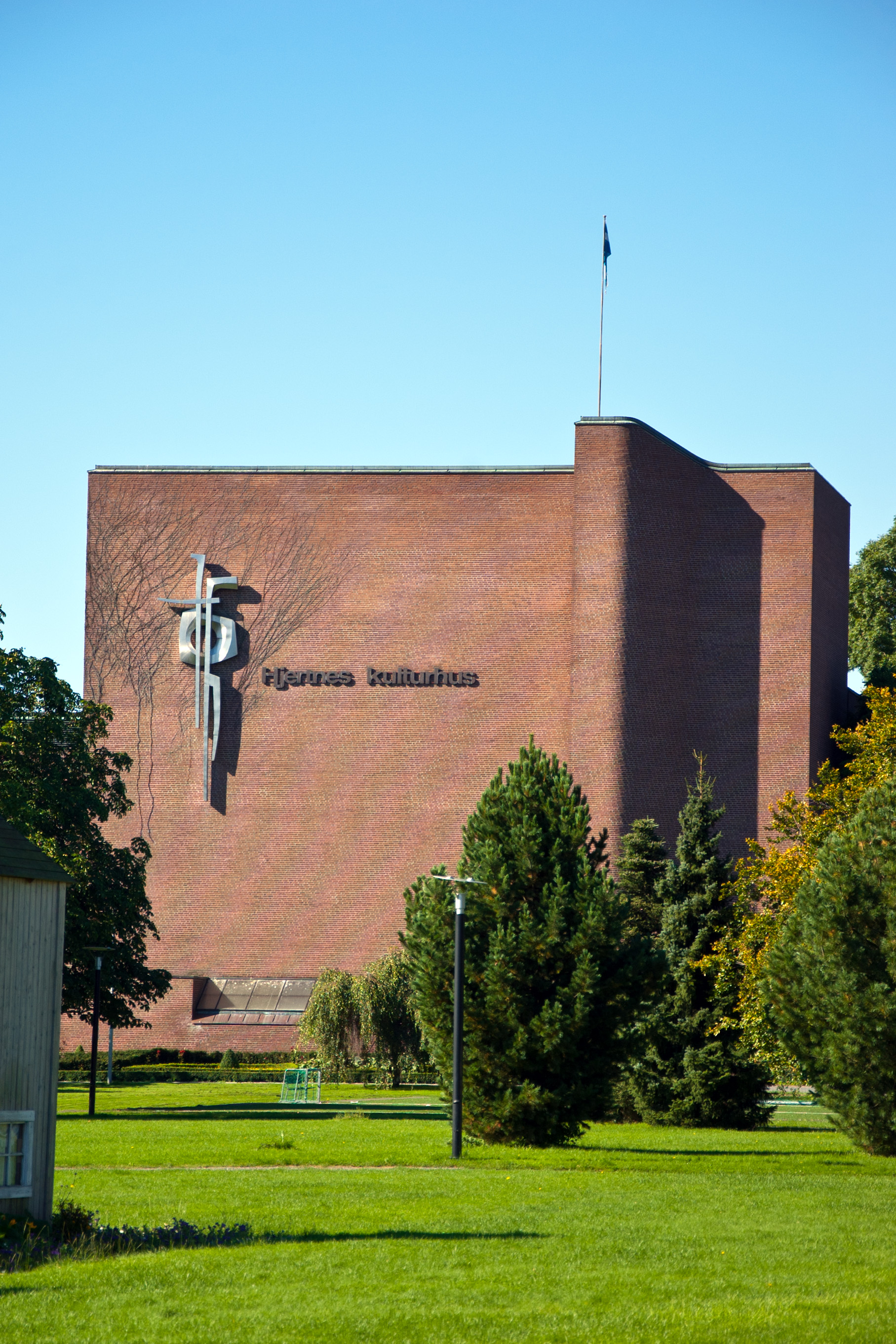 Hjertnes kulturhus, Sandefjord